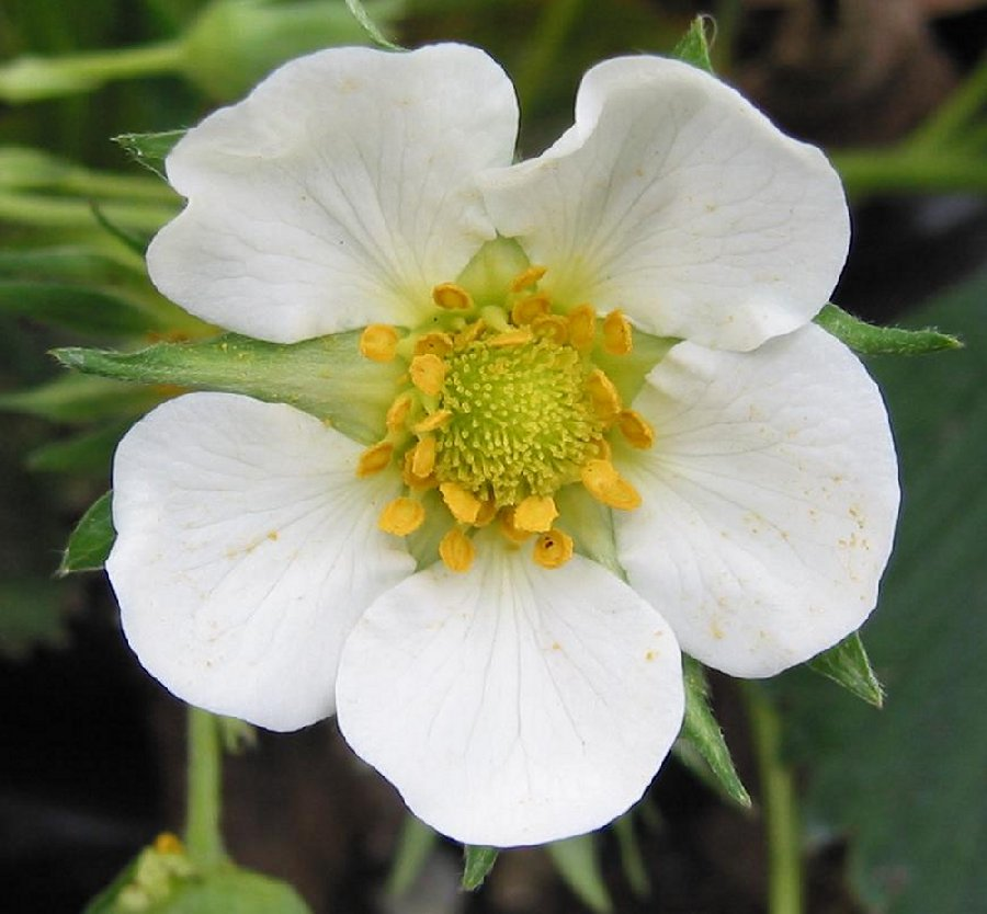 close-up van aardbeibloem